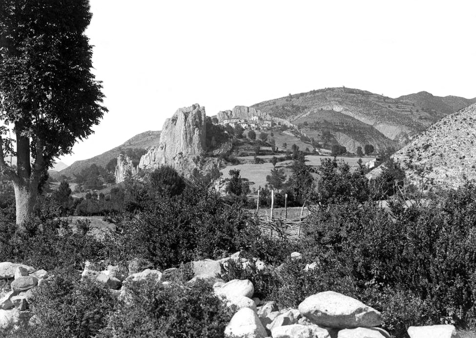 Imatge